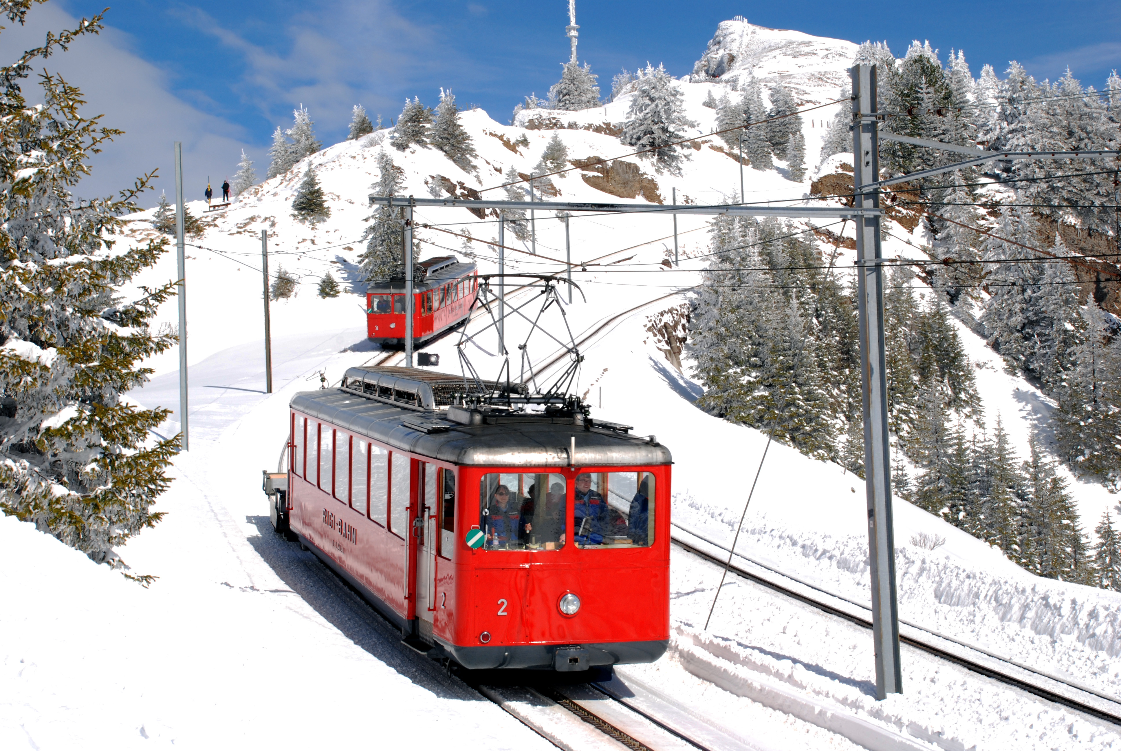 Elektrische Motorwagen aus dem Jahr 1937 der Vitznau Rigibahn kurz vor Einfahrt in den Bahnhof Rigi-Staffel. Im Hintergrund ist der Rigigipfel zu sehen. Rail cars of the Vitznau-Rigibahn from 1937, shortly before its arrival at Rigi Staffel. In the background, the peak of Mt. Rigi is visible.